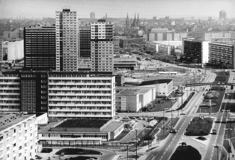 Halle, Neustadt, Wohnblocks, Wohnhochhäuser ADN-ZB Lehmann 30.4.82 Halle: Fast 100.000 Einwohner zählt heute die Chemiearbeiterstadt Halle-Neustadt. Überwiegend Werktätige aus den Chemiekombinaten Leuna und Buna sowie aus anderen Großbetrieben sind hier zu Hause. Neben modernen und komfortablen Wohnhäusern prägen Sozial-, Kultur-, Sport- und Dienstleistungseinrichtungen das Bild von Halle-Neustadt.